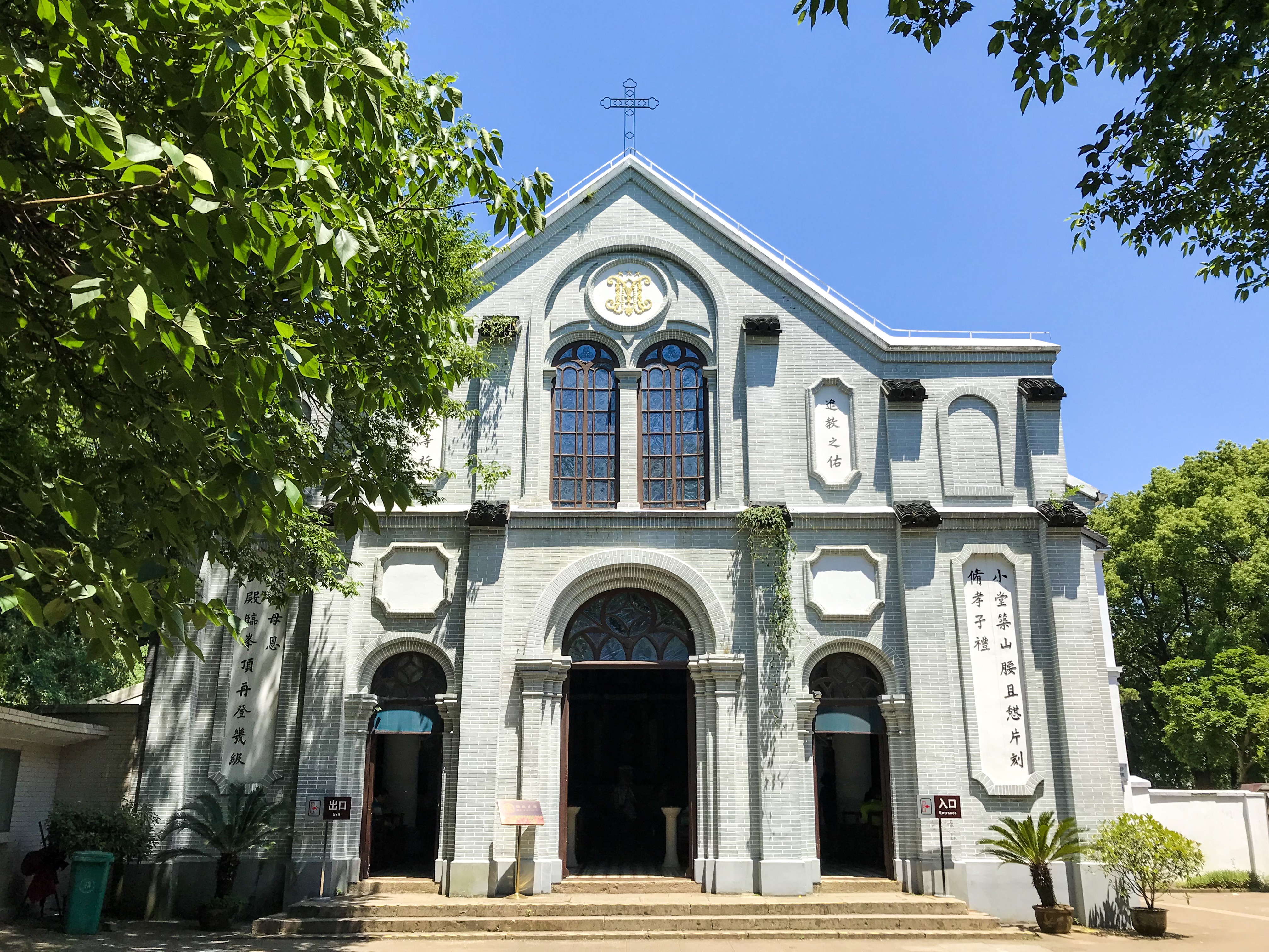 中文（中国大陆）: 佘山中山圣母中保堂